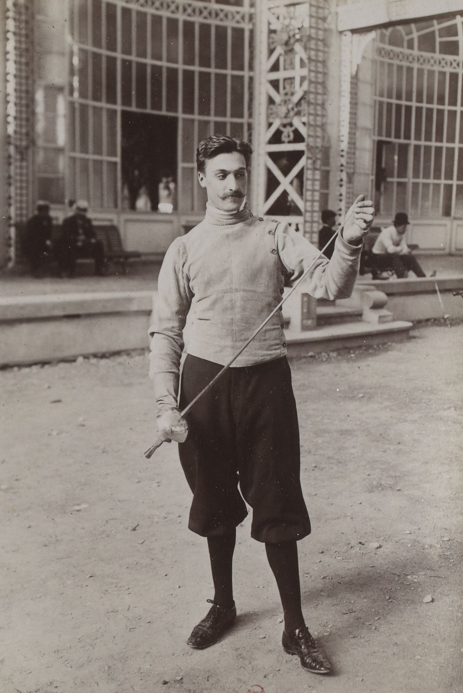 [Collection Jules Beau. Photographie sportive] : T. 15. Année 1901 / Jules Beau.